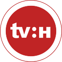 Simple, moderne Logovariante von TV Halle